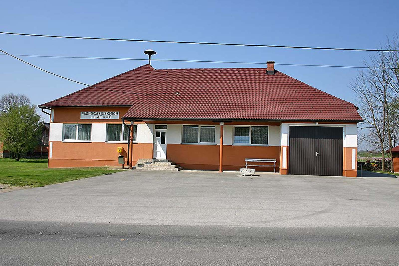 Prostovoljno gasilsko društvo Lemerje. Volunteer fire Lemerje. Freiwillige Feuerwehr Lemerje.